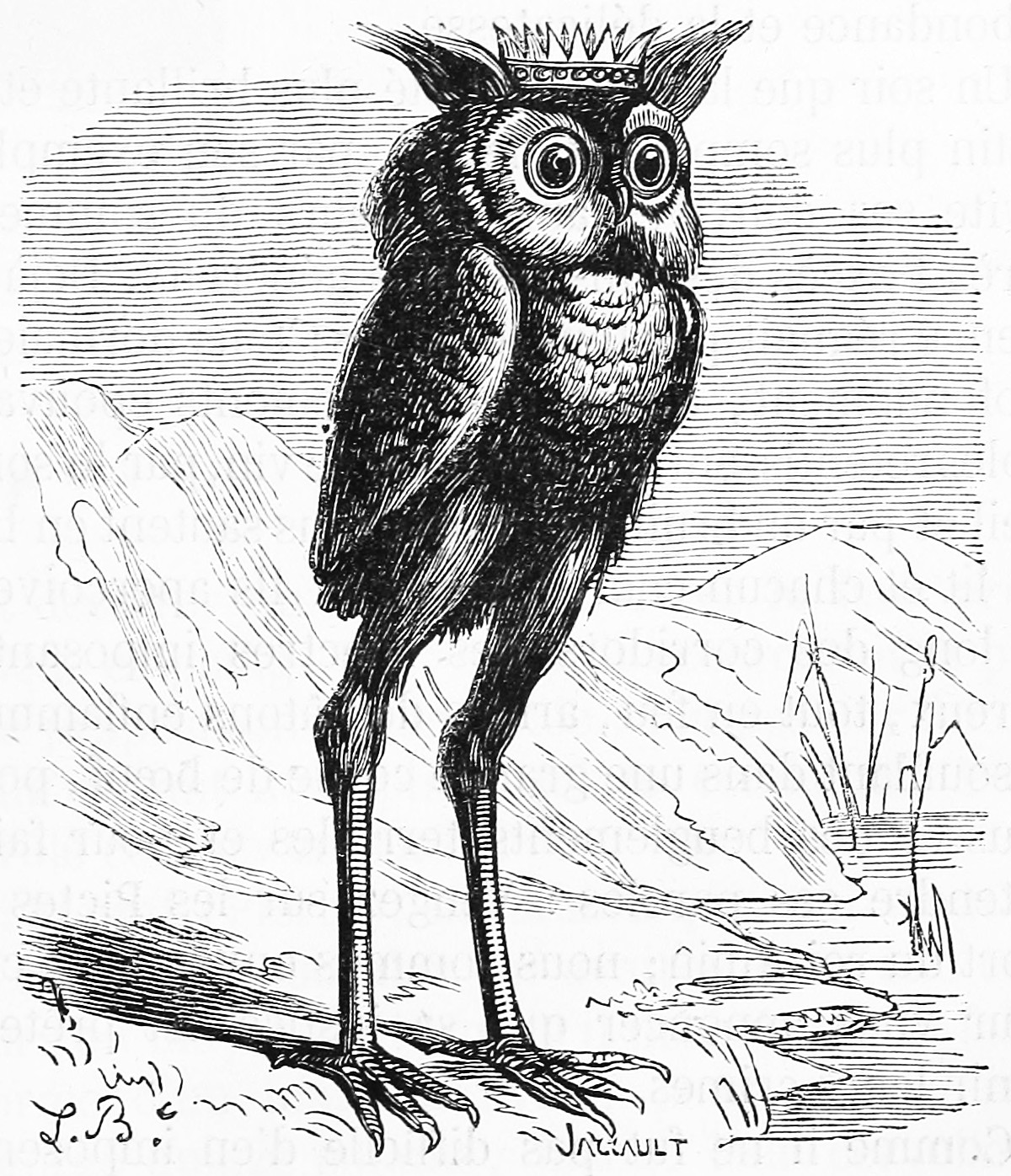 Stolas. Illustration du Dictionnaire infernal de Jacques Auguste Simon Collin de Plancy par Louis Le Breton, 6eme édition, 1863.